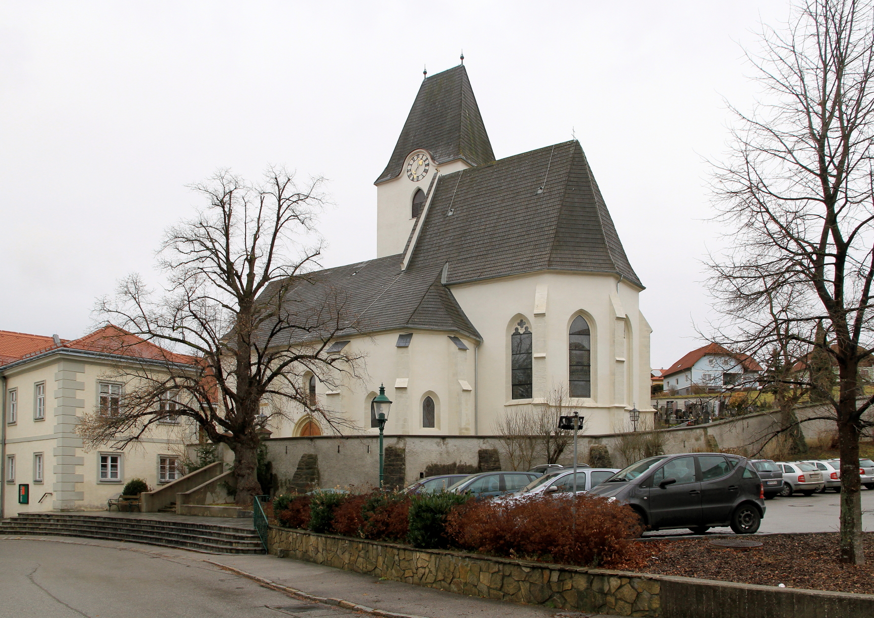 Die katholische Pfarrkirche hl. Mauritius in der niederösterreichischen Gemeinde Kasten bei Böheimkirchen.